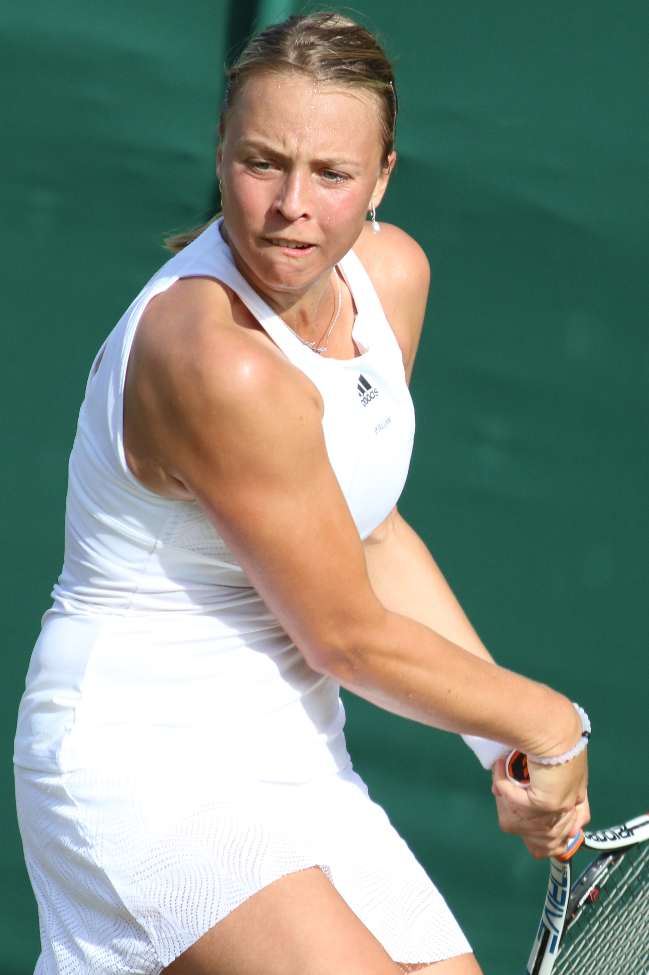 Kontaveit WM17 (15)